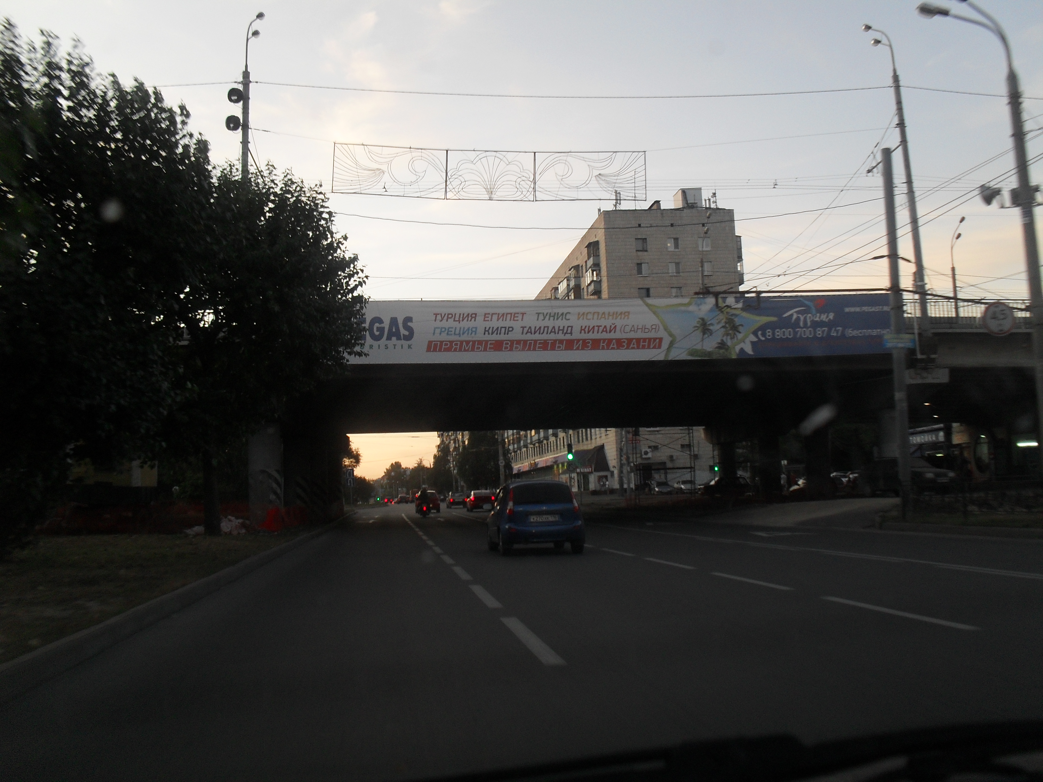 проспект Ибрагимова проходит под эстакадой пр.Ямашева